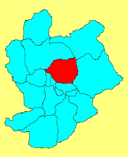 崇礼县在张家口市的位置；此图片由王云峰wangyunfeng原创，用于WIKI。